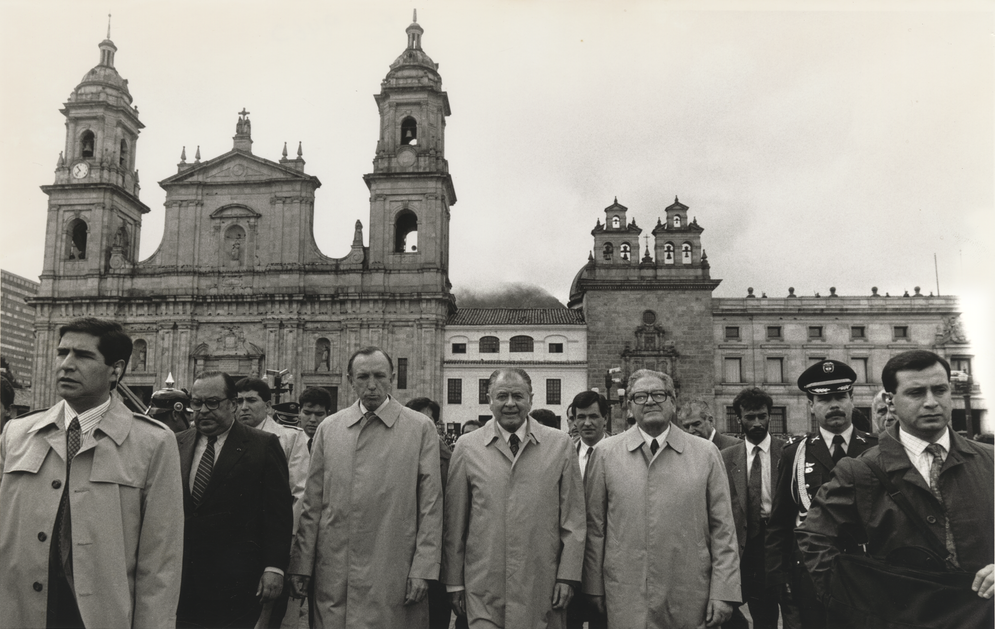 Presidente Patricio Aylwin, junto a Enrique Silva Cimma y altas autoridades políticas chilenas en la plaza Simón Bolívar, Bogotá.